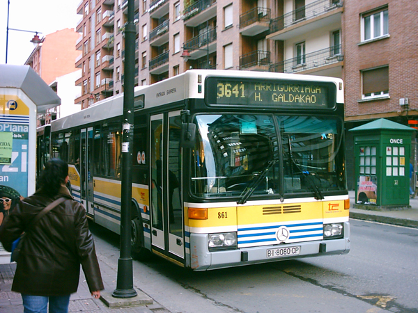 Vehículo de transporte público de la empresa BizkaiBus, operadora en el País Vasco.